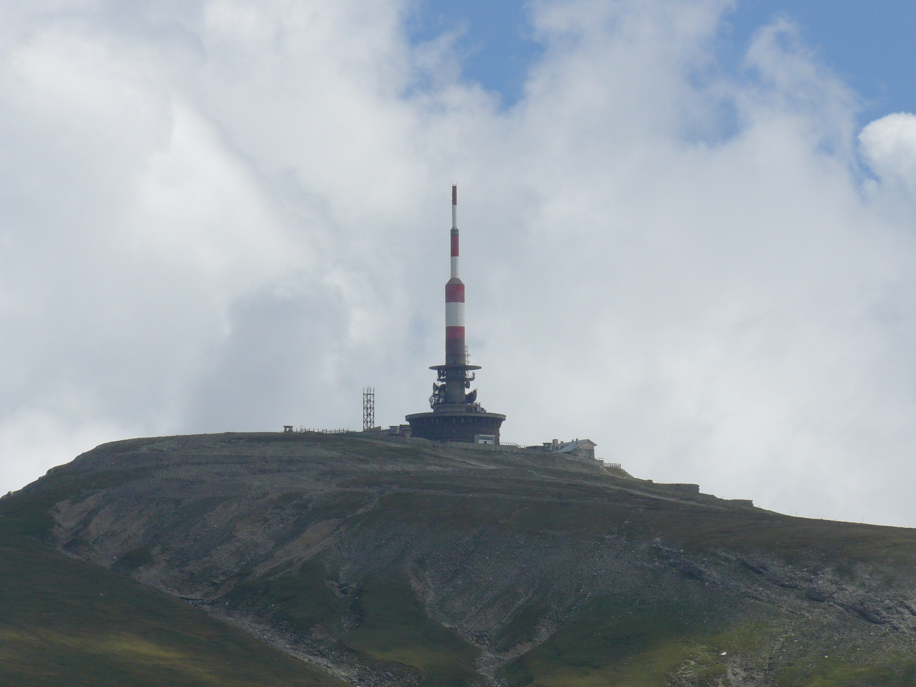 Sinaia - Cota 1400 - Cota 2000 - Cabana Valea Dorului - Cabana Diana - Manastirea Ialomicioarei - Babele - Vf. Omu (Cabana Omu) - Valea Cerbului - Busteni